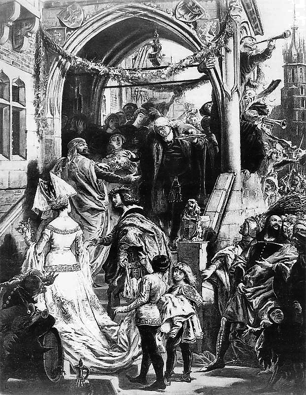 Jan Matejko, Wierzynek's Banquet